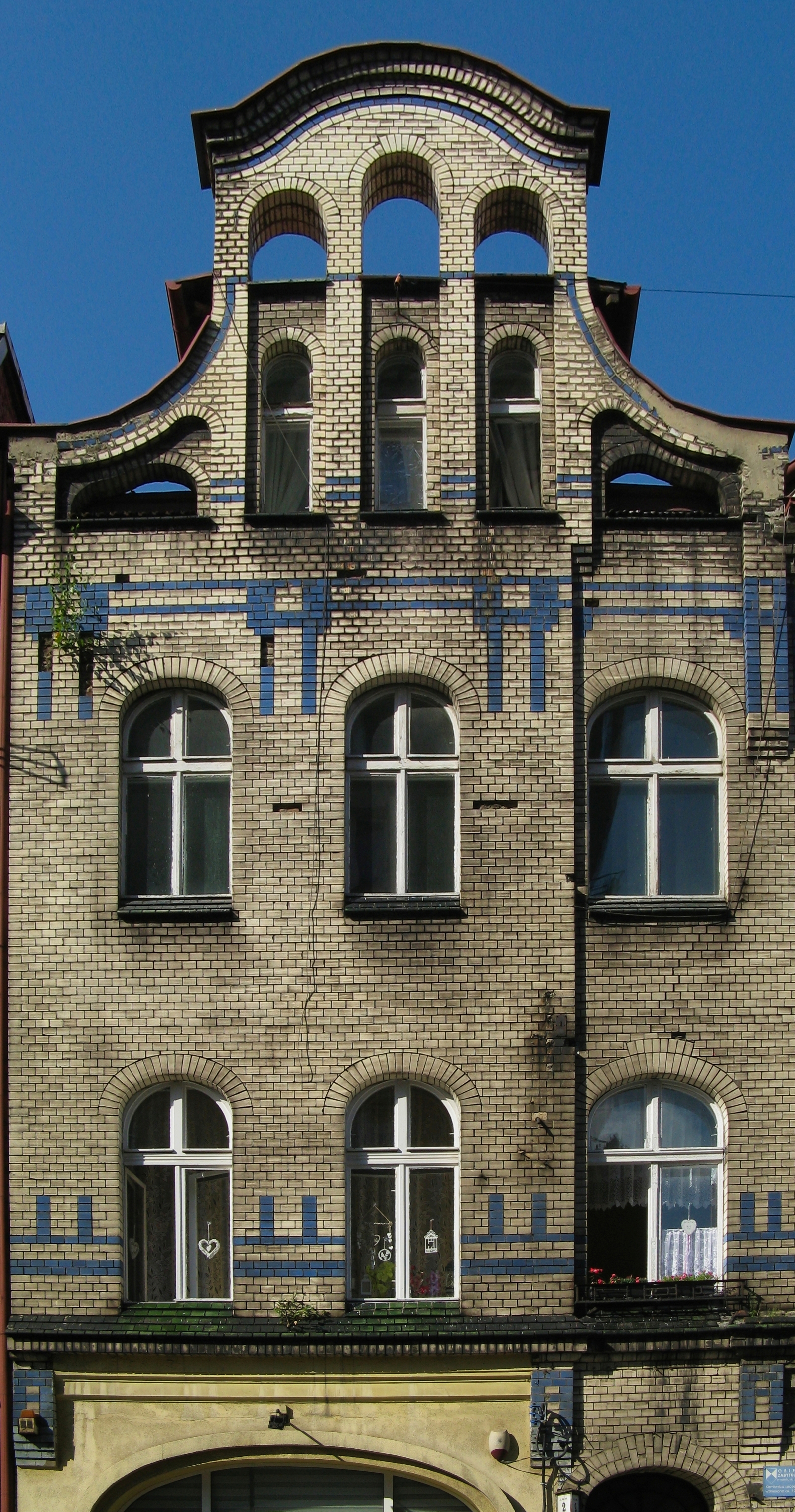 kamienica przy ul. Kościelnej 2, fragment fasady południowo-zachodniej, kondygnacje druga i trzecia